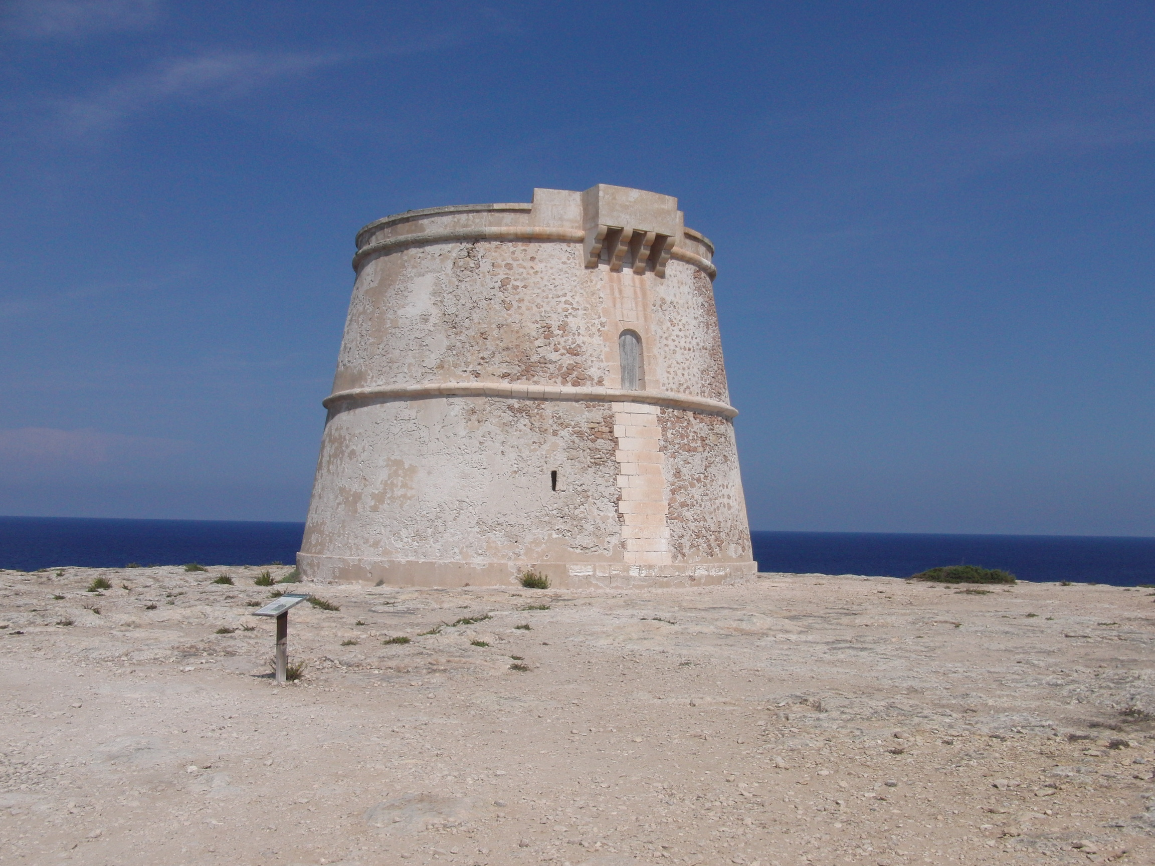 Torre des sa Punta Prima auf Formentera, Balearen. Bestandteil der frühen Schutzanlagen gegen Piratenüberfälle aus dem